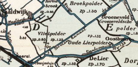 Oude Lierpolder